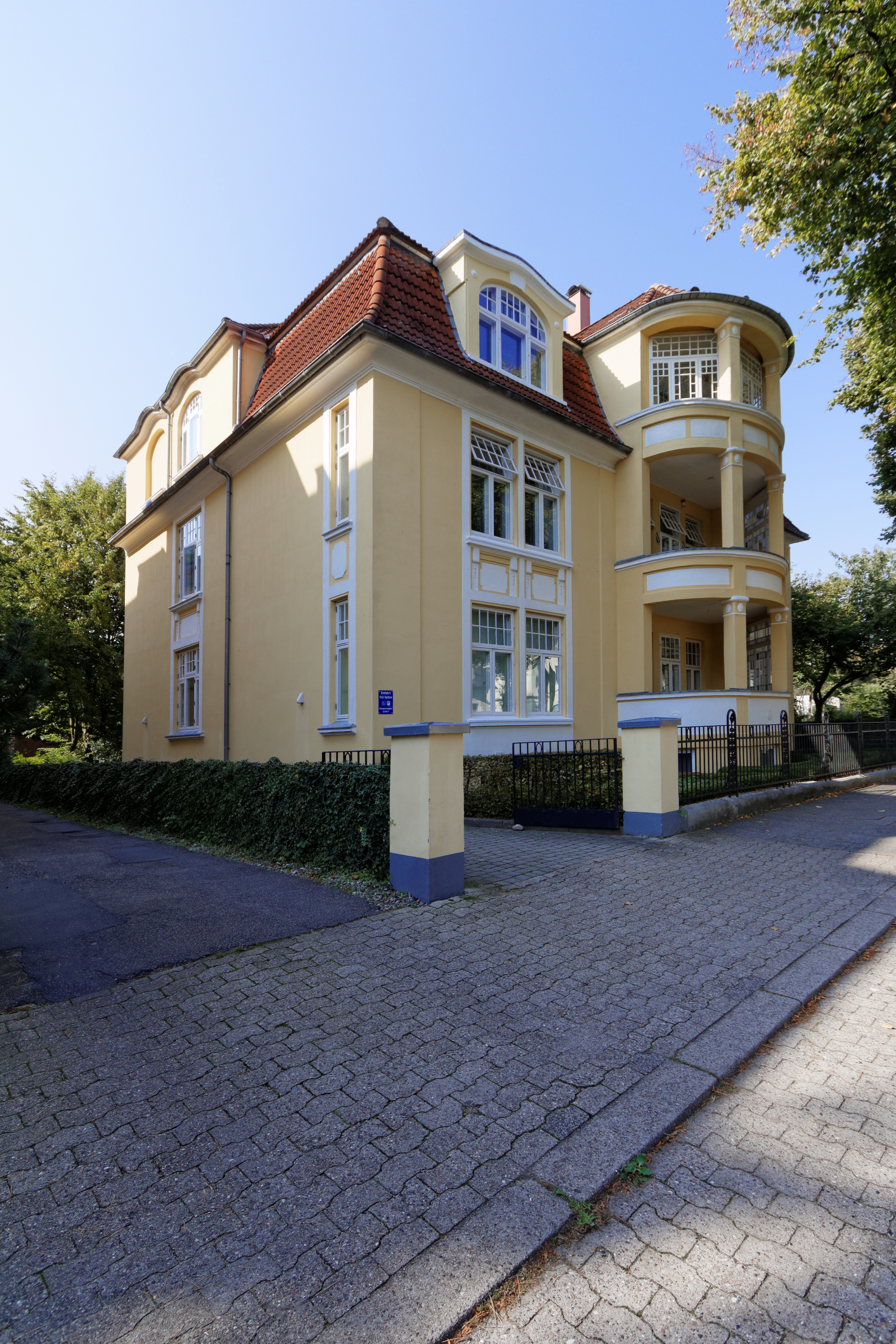 Flensburg, Marienhölzungsweg 47